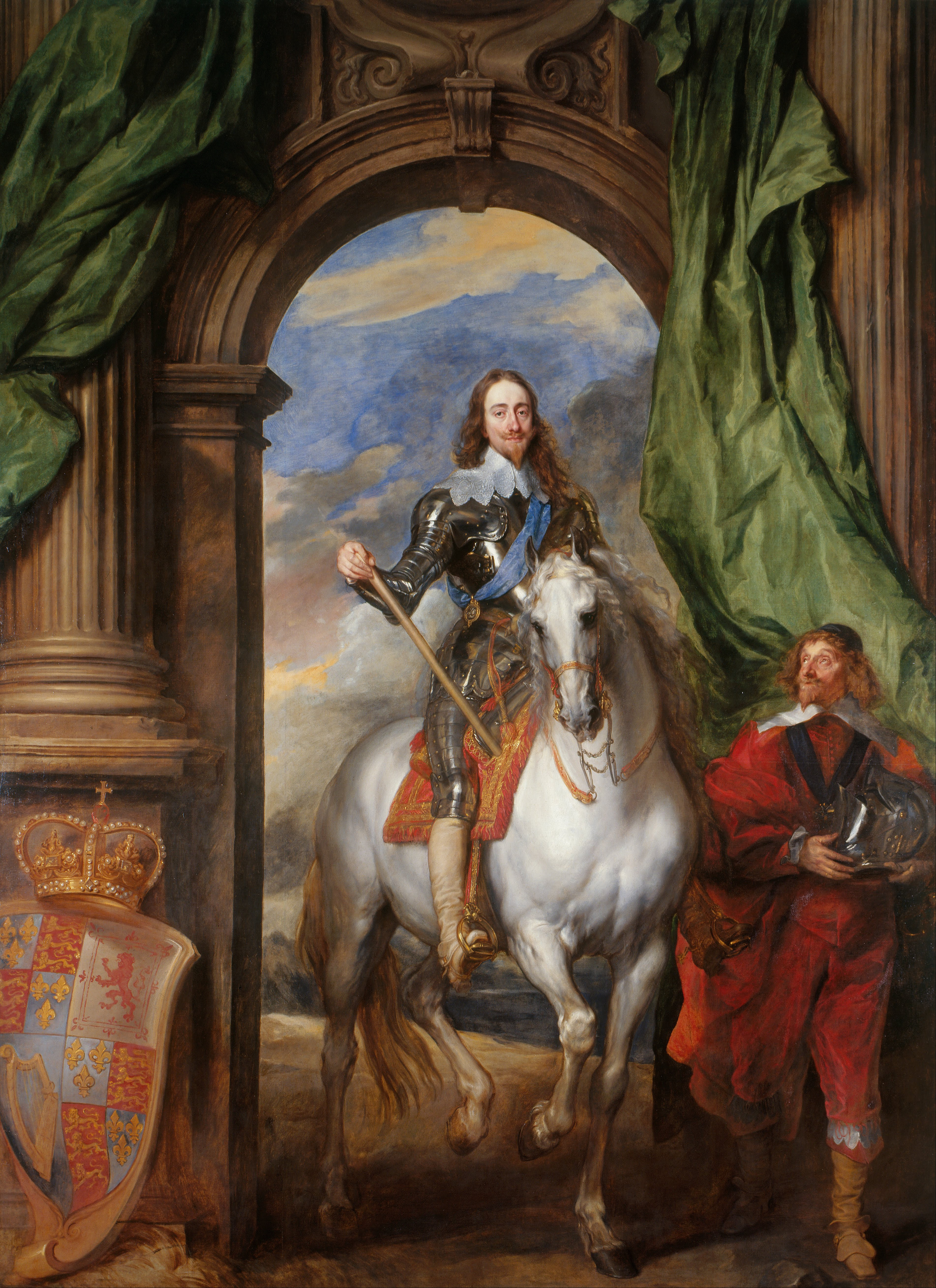 Porträt Karl I., König von England, zu Pferd mit seinem Stallmeister St. Antoine Charles I of England (1600-1649)